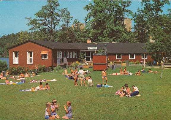 Ågestagården, fritidsområde